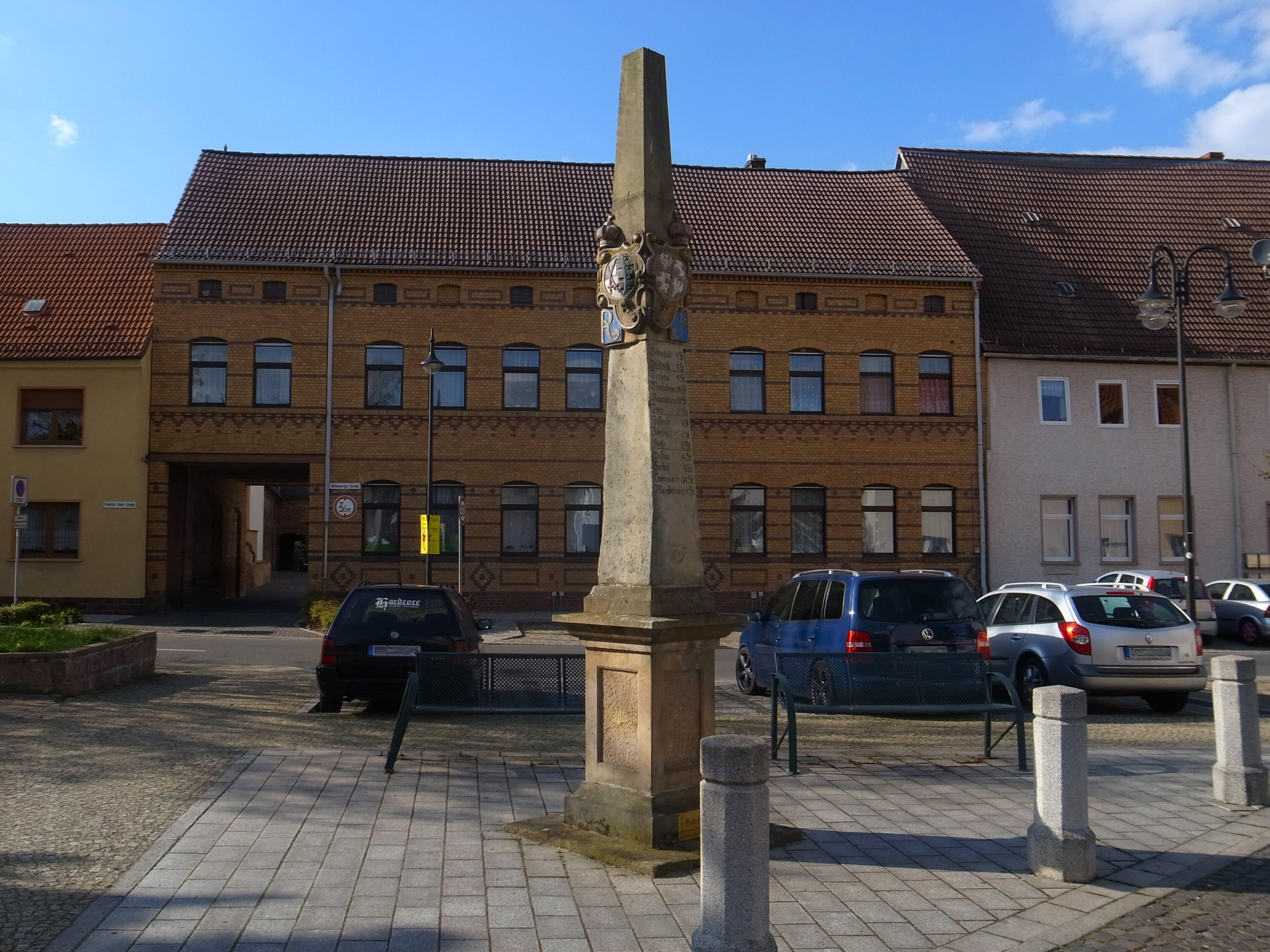 Gräfenhainichen, Distanzstein